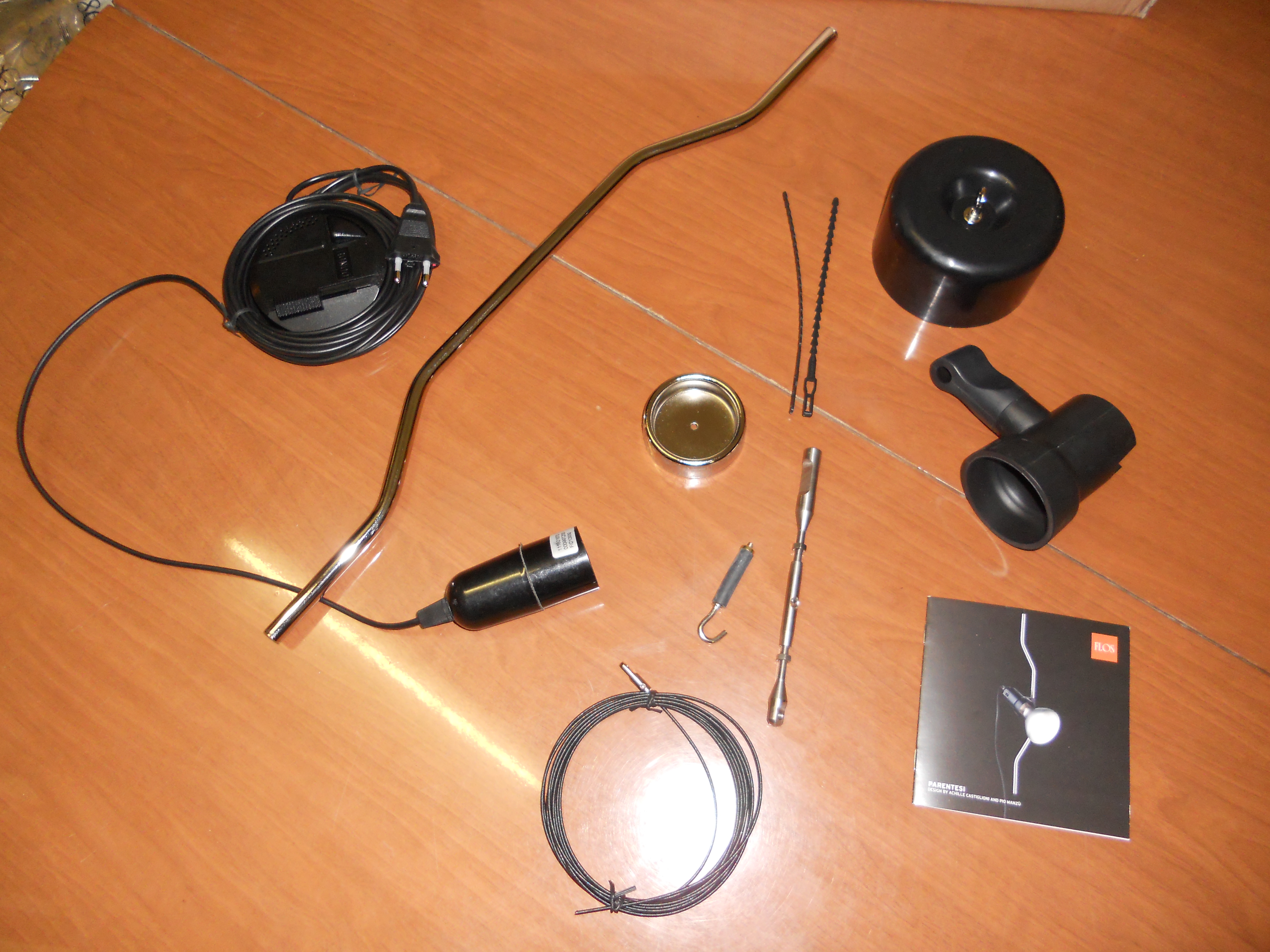 Una lampada "Parentesi", prima del montaggio, appena tirata fuori dall'imballaggio. Sono presenti tutti i componenti della lampada tranne la lampadina